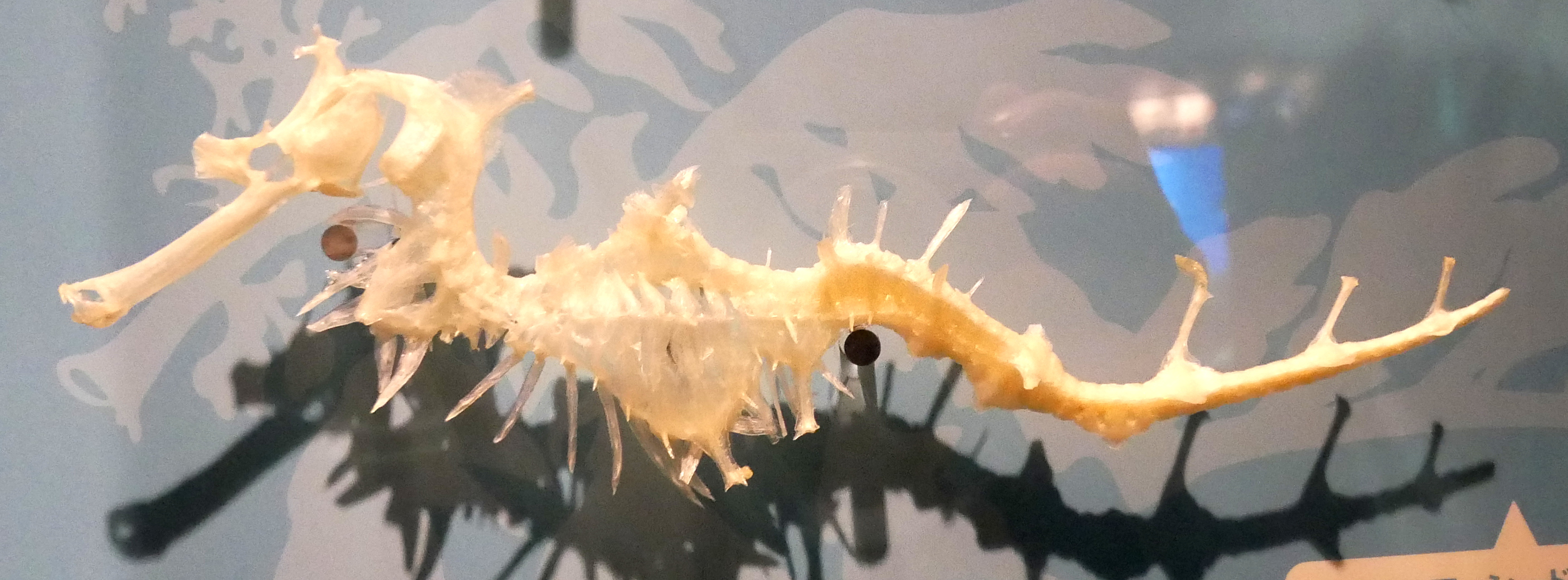 leafy seadragon skeleton